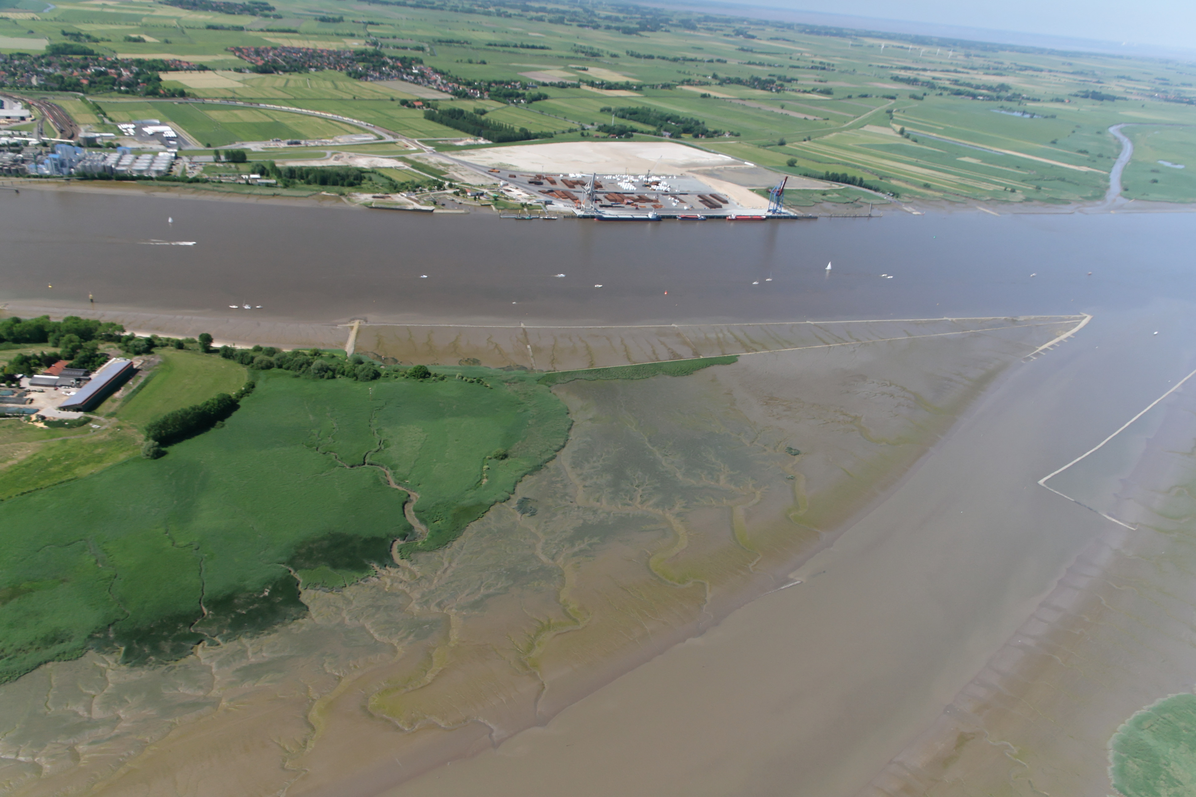 Luftaufnahme der Weser bei Brake dem Rechten Nebenarm der Weser und der Harriersand-Nordspitze (vorne)